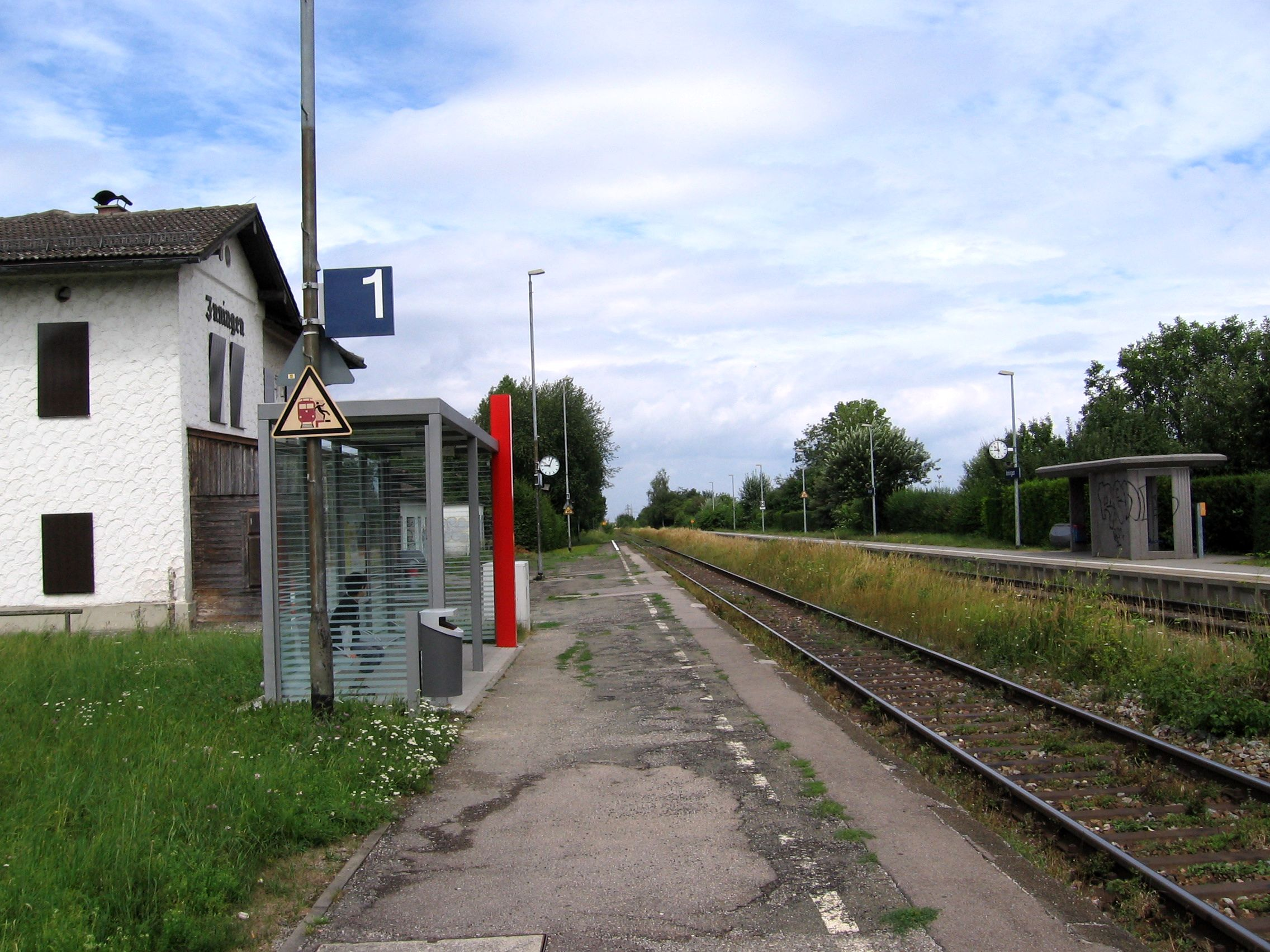 Zusehen ist der Bahnhof des augsburger Stadtteils Inningen